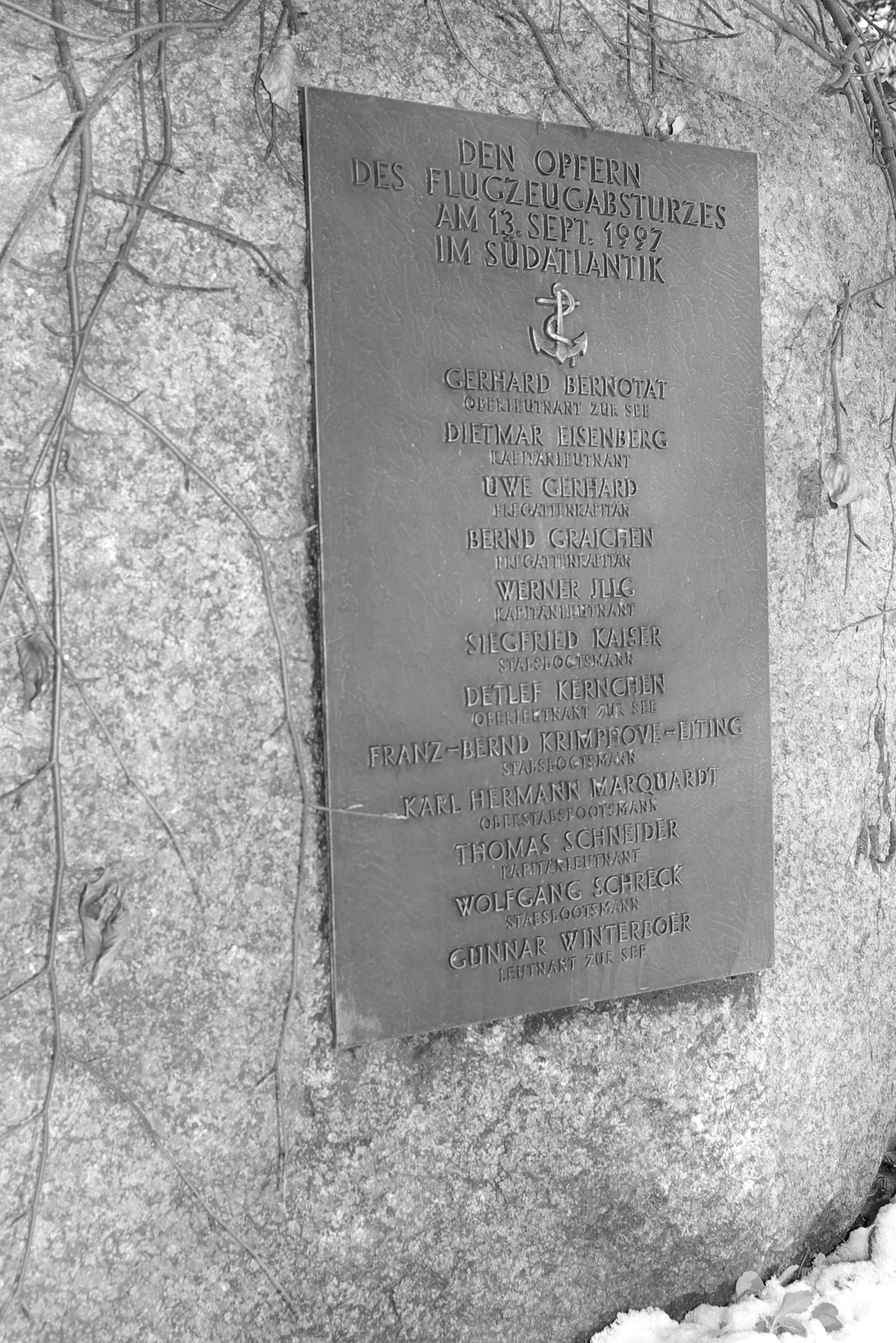 Ehrenfriedhof Wilhelmshaven, Gedenkstein zur Flugzeugkollision vor Namibia 1997. Namentlich erwähnt werden: Oberleutnant zur See Gerhard Bernotat, Kapitänleutnant Dietmar Eisenberg, Fregattenkapitän Uwe Gerhard, Fregattenkapitän Bernd Graichen, Kapitänleutnant Werner Jllg, Stabsbootsmann Siegfried Kaiser, Oberleutnant zur See Detlef Kernchen, Stabsbootsmann Franz-Bernd Krimphove-Eiting, Oberstabsbootsmann Karl Hermann Marquardt, Kapitänleutnant Thomas Schneider, Stabsbootsmann Wolfgang Schreck, Leutnant zur See Gunnar Winterboer. Die Besatzung und ein mitfliegender Techniker werden auf dem Stein nicht erwähnt!